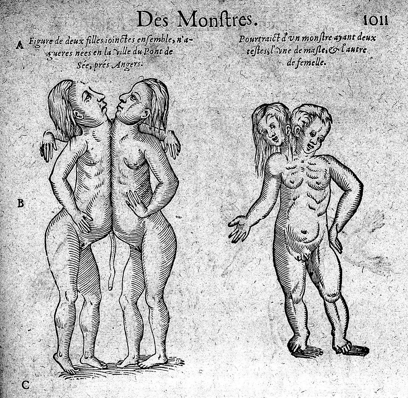 Siamese twins: "Des monstres" Rare Books Keywords: siamese twins; Ambroise Paré